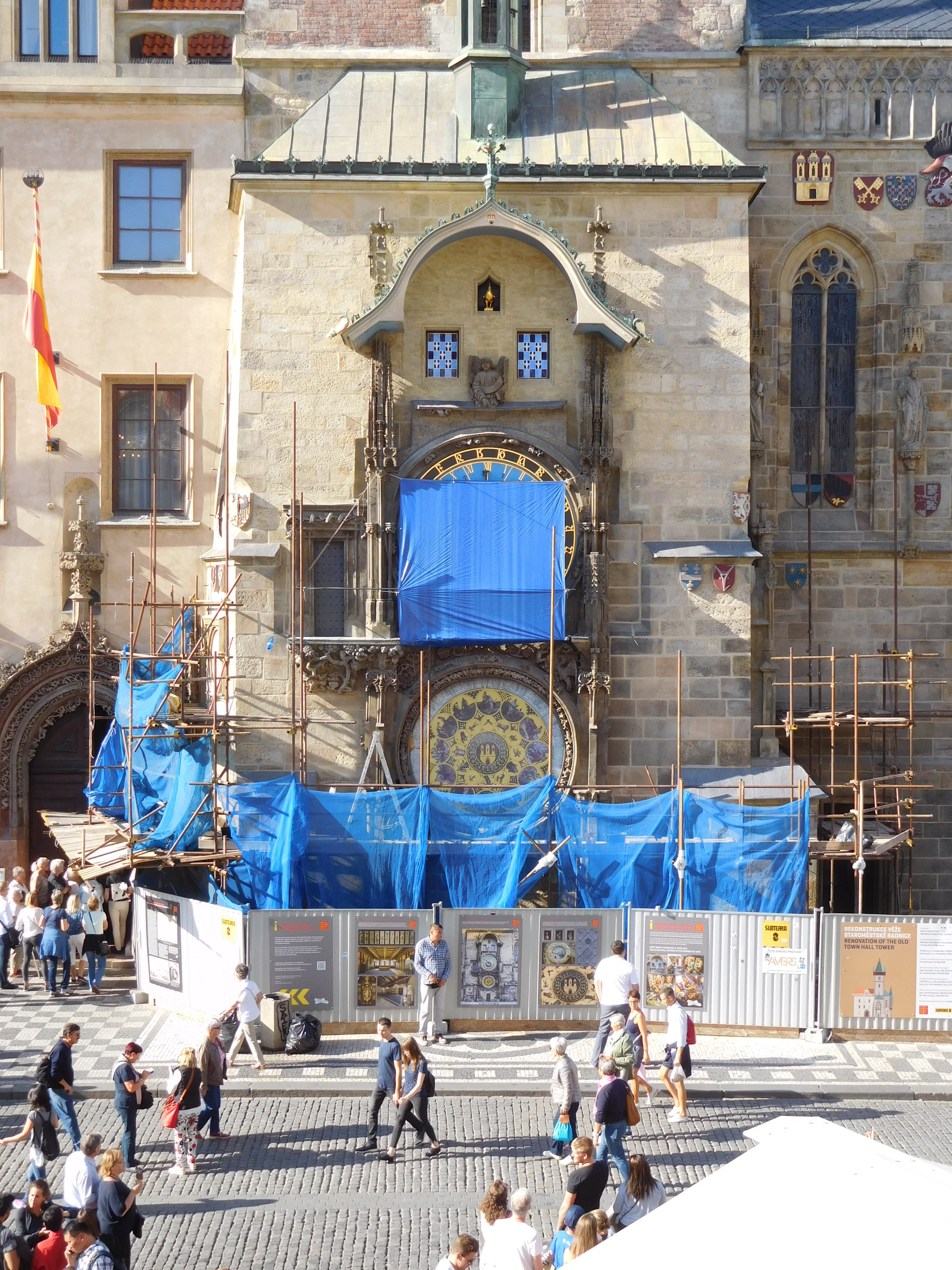 Praha, Staroměstská radnice - dokončování rekonstrukce orloje (pohled z domu U červené lišky)